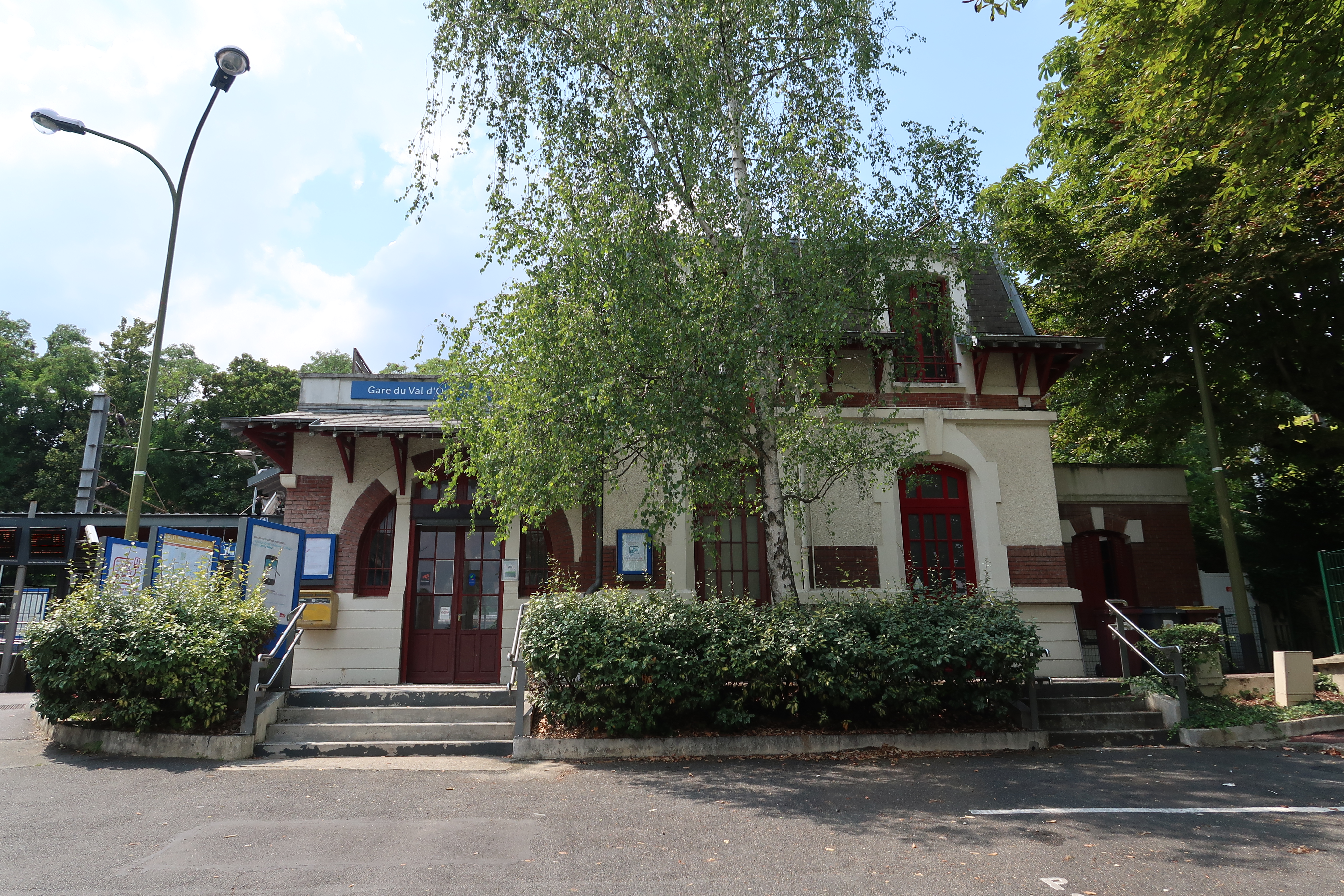 Gare du Val d'Or à Saint-Cloud (Hauts-de-Seine).